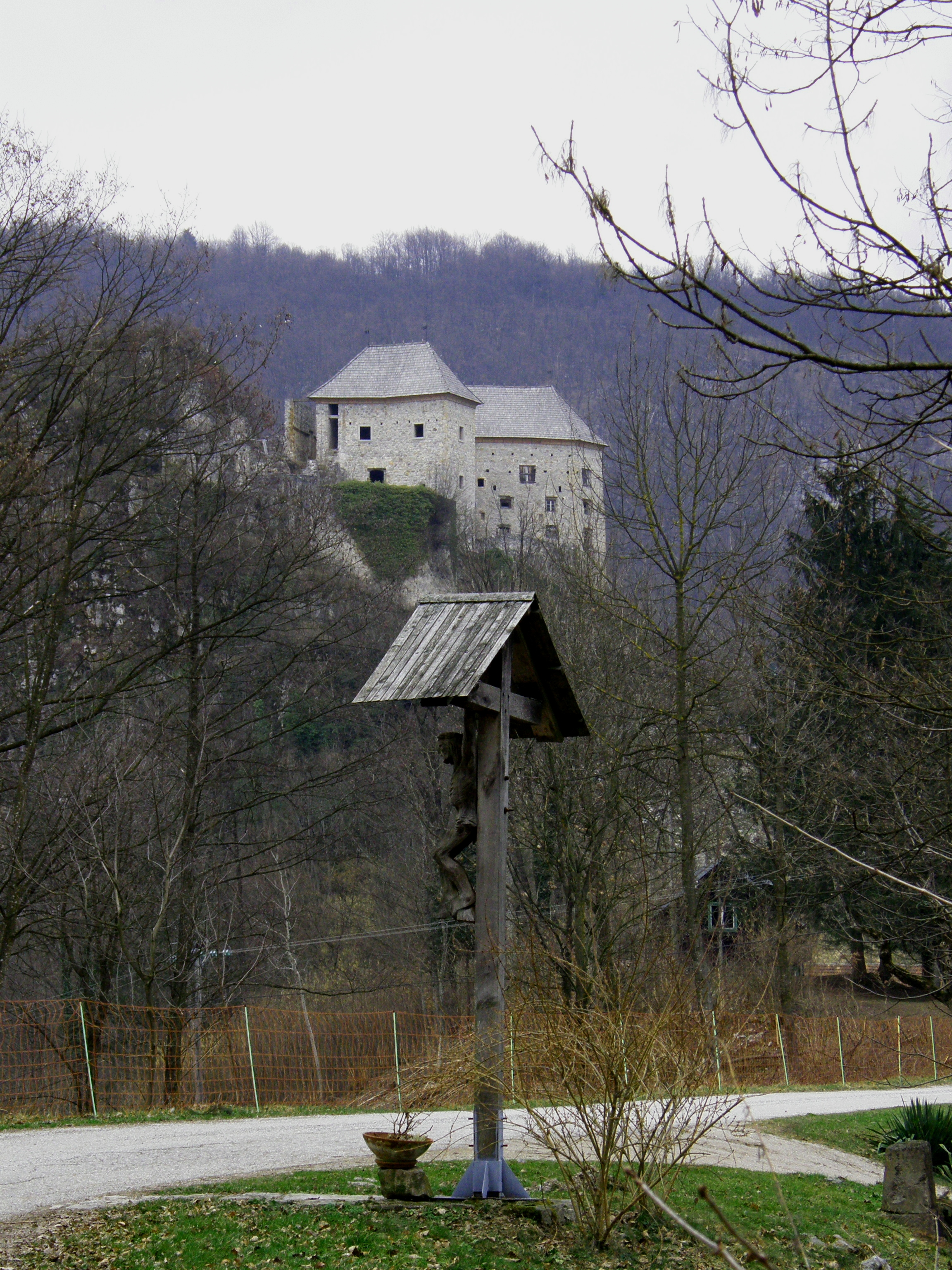 Kostel castle in Slovenia